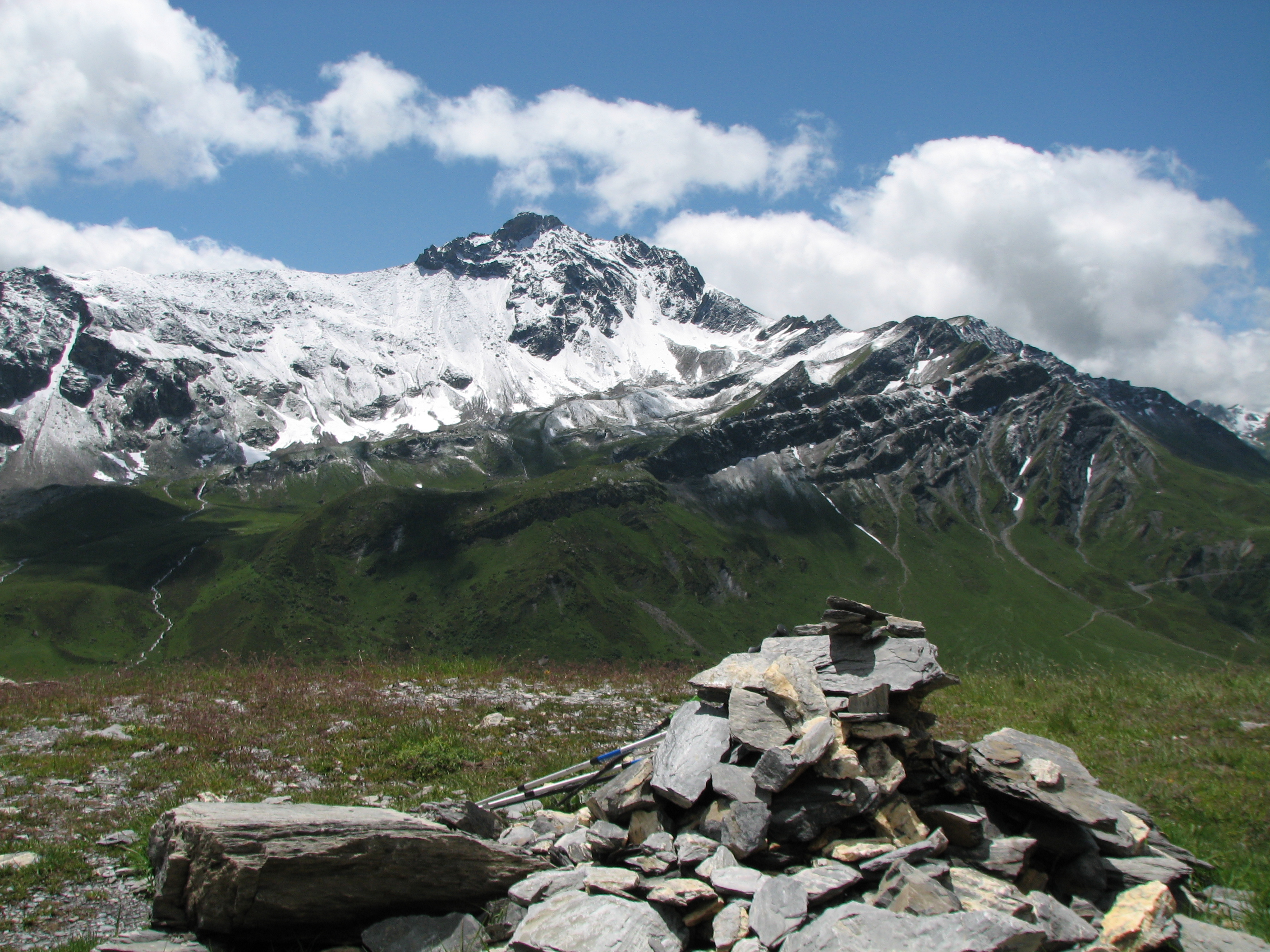 Aiguille du Grand Fond vue depuis Rocher du Vent